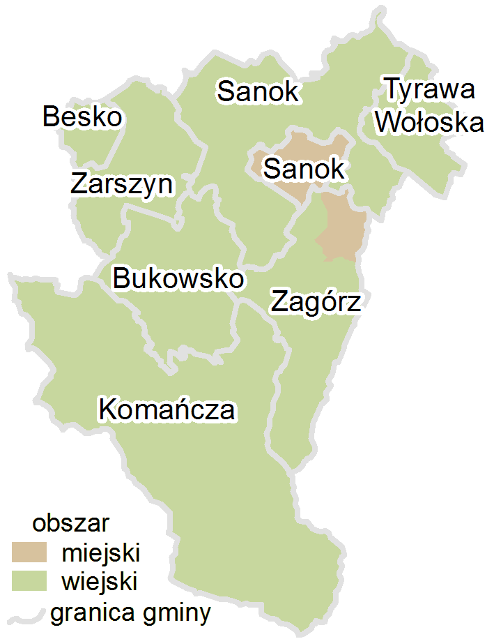 gminy powiatu sanockiego 2